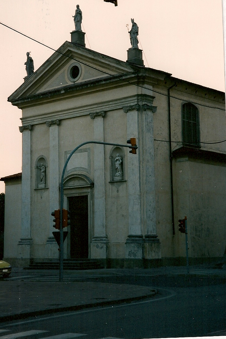 façade de l'église paroissiale San Biagio de Caltana (Vénétie)